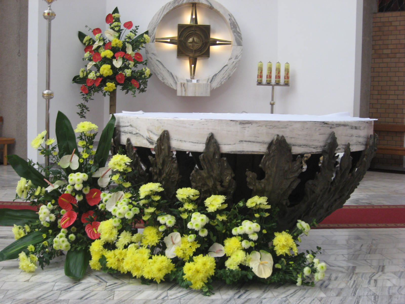 Ołtarz